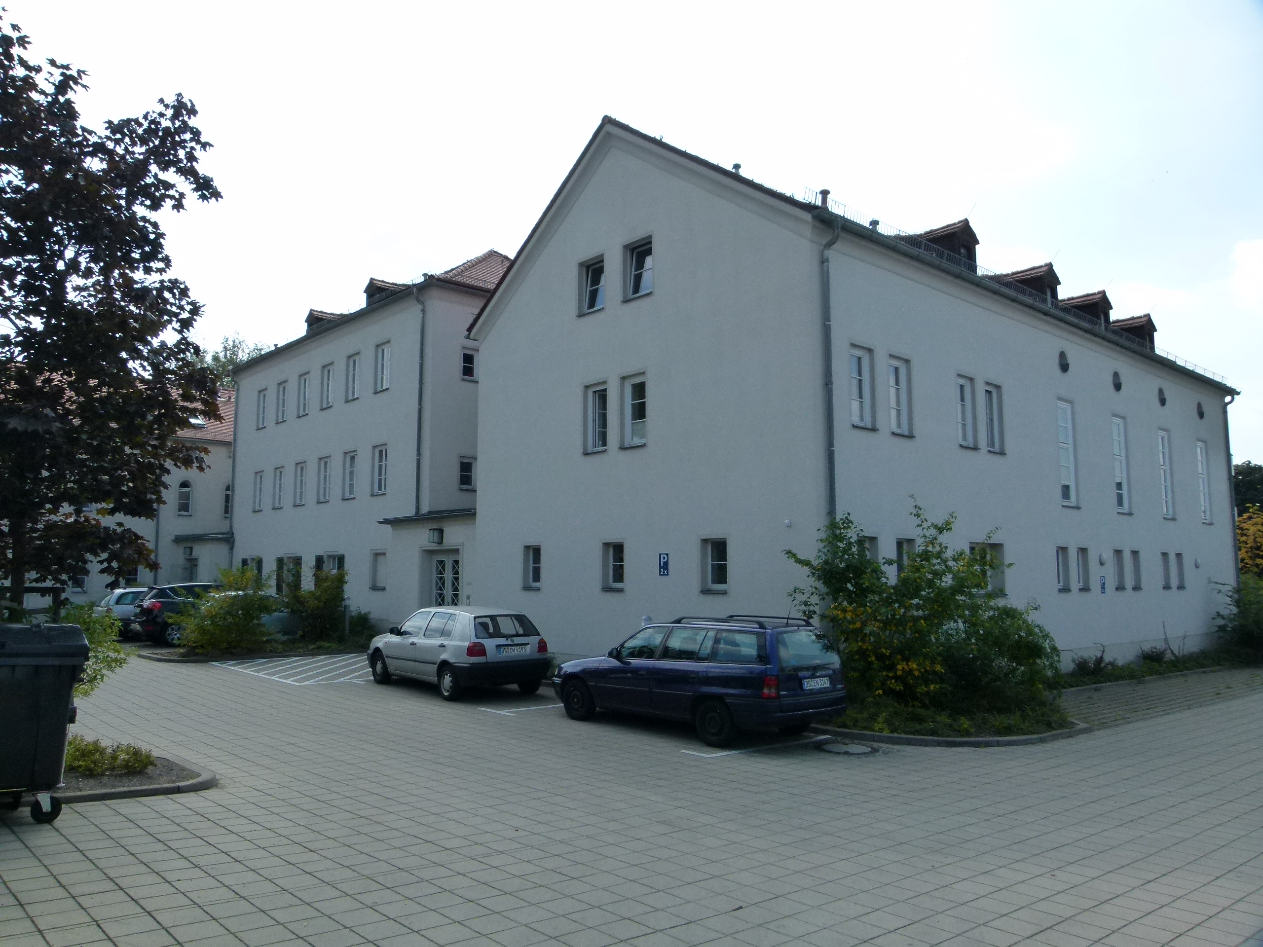 Denkmalgeschütztes Haus, Heinrich-Zille-Straße 15, Radebeul, Sachsen